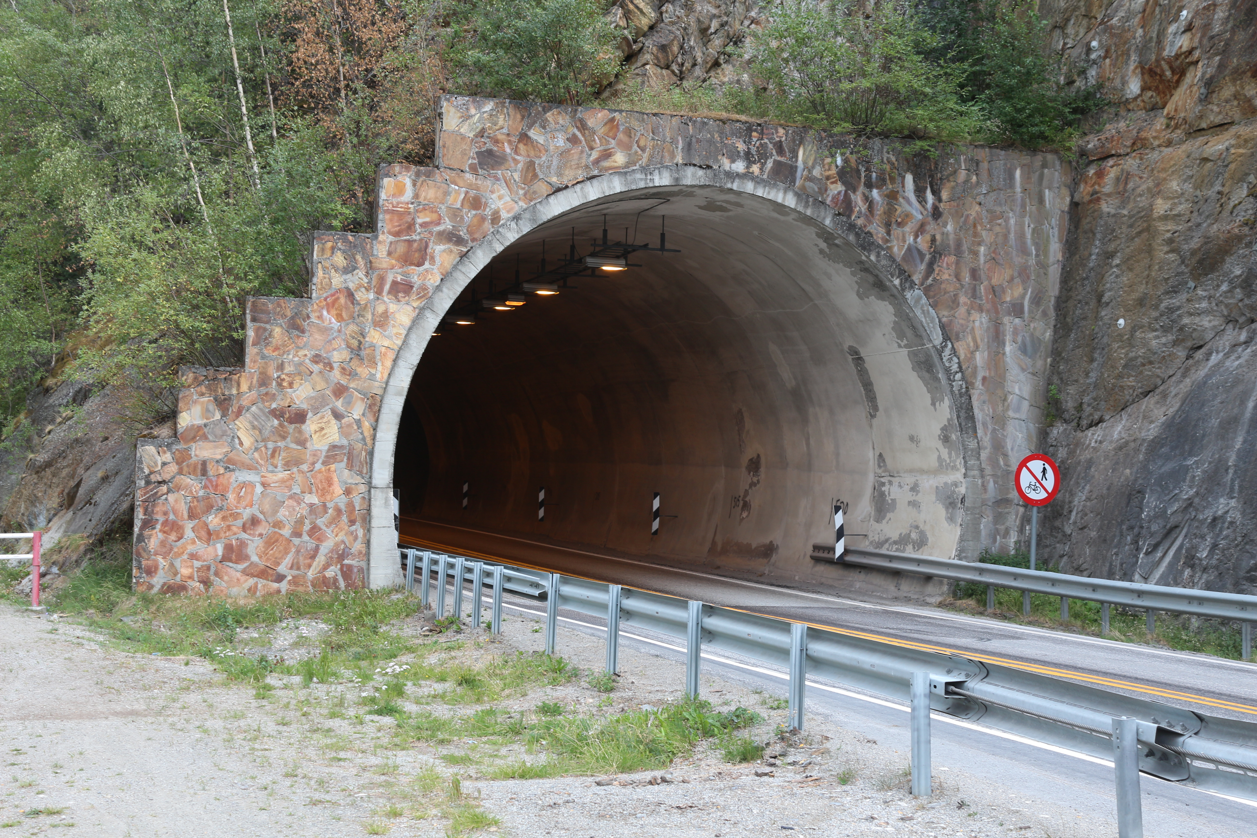 Vestside